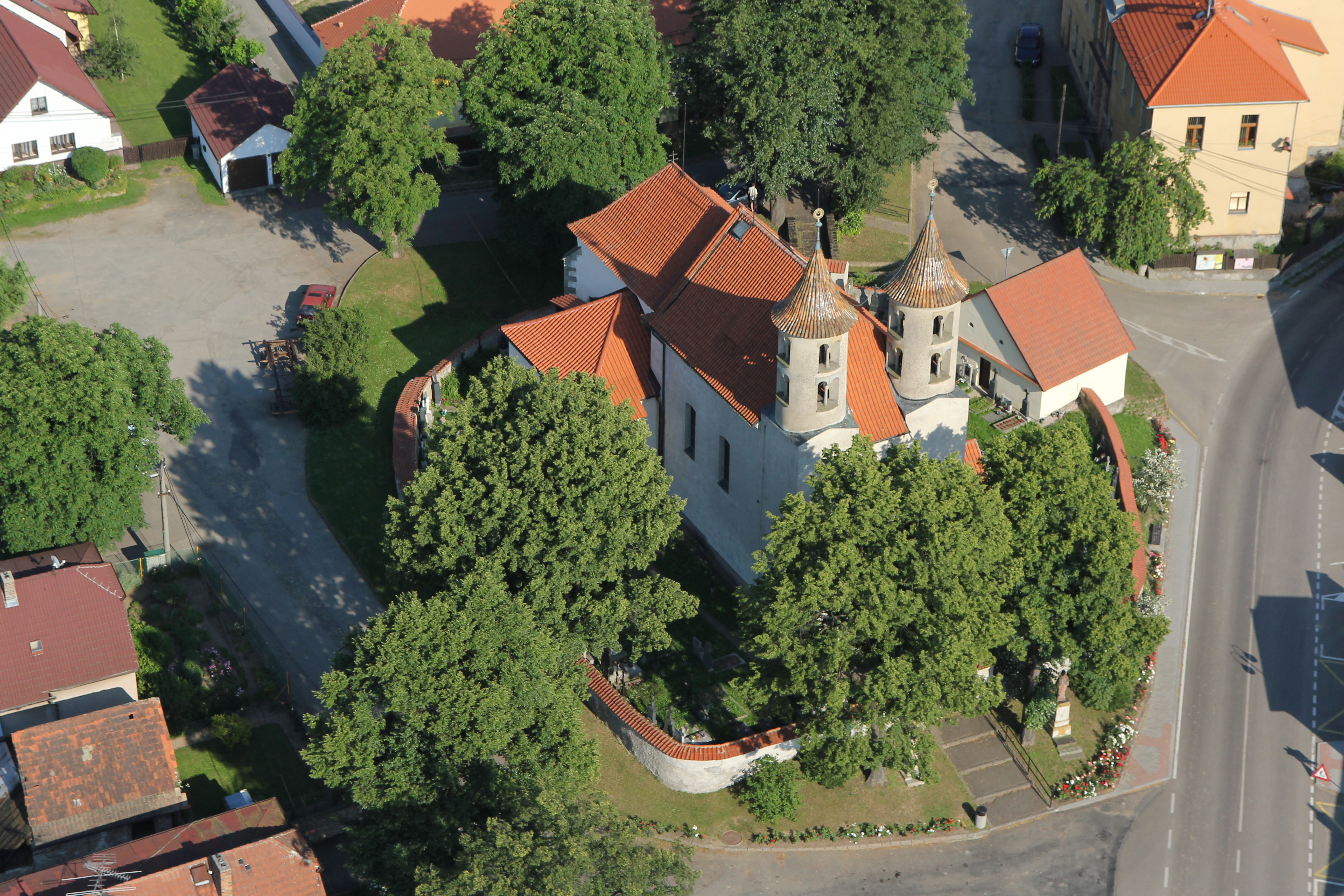 Kostel sv. Bartoloměje (Kondrac), náves, Kondrac